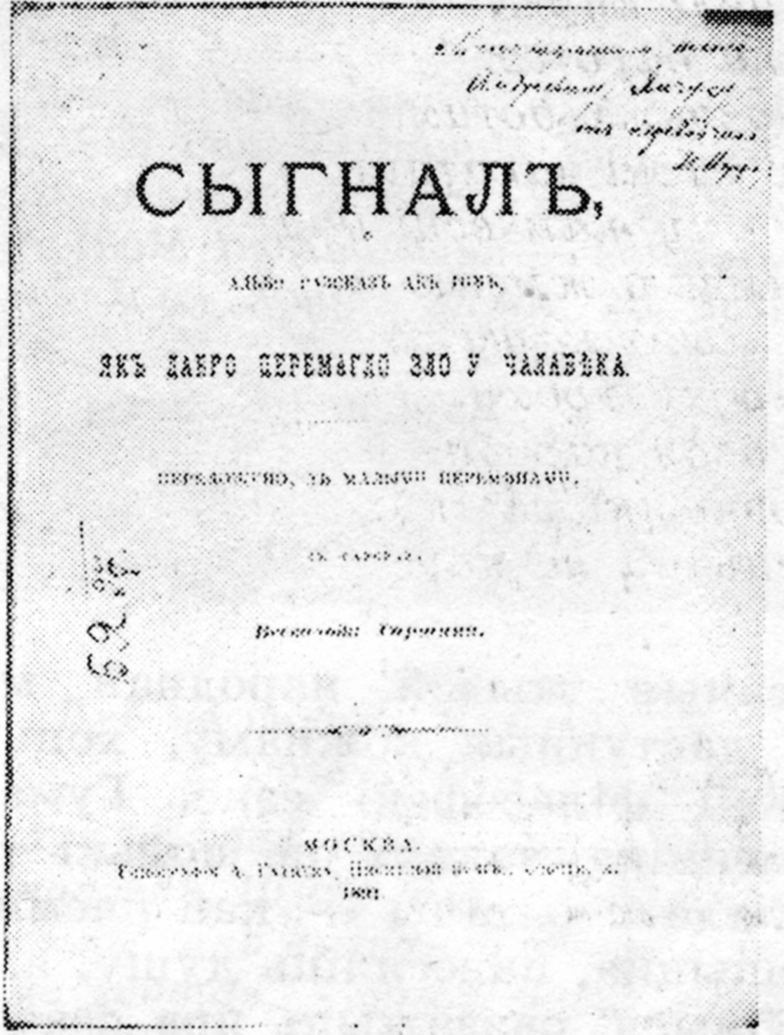 Беларуская (тарашкевіца): Вокладка кнігі Ўсевалада Гаршына «Сыгнал» у перакладзе Ядвігіа Ш. з аўтографам перакладніка Міколу Янчуку